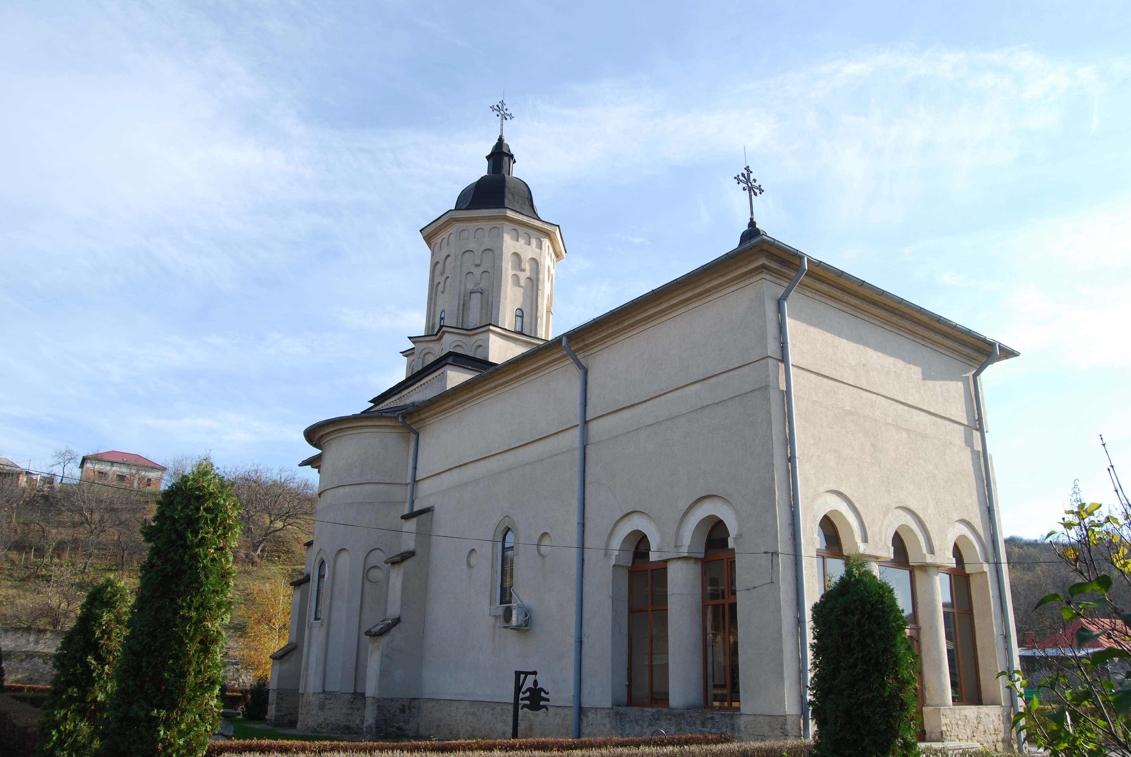 Biserica "Sf. Gheorghe" 01